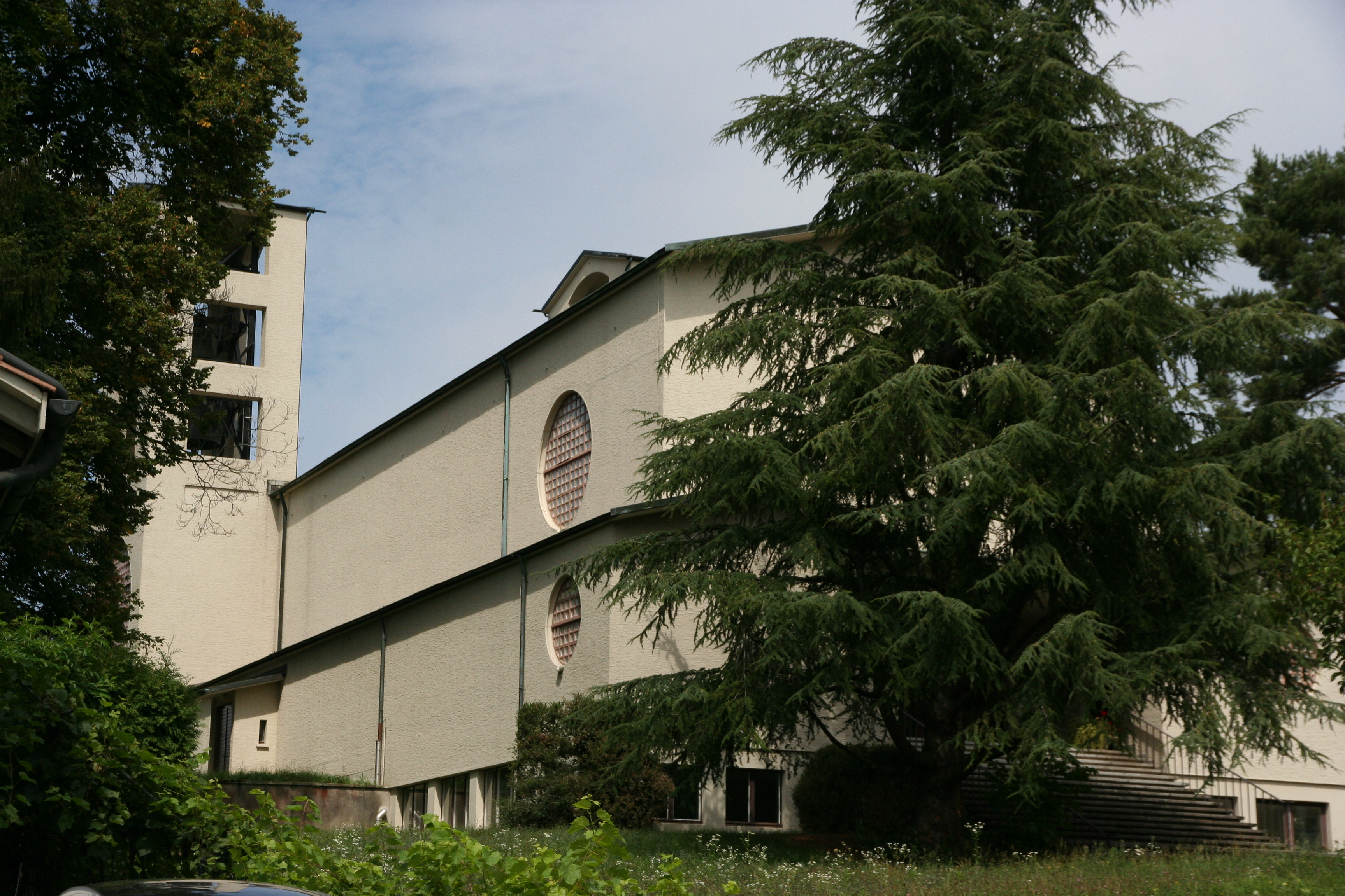 Römisch-katholische Pfarrkirche Maria Himmelfahrt Schönenwerd SO